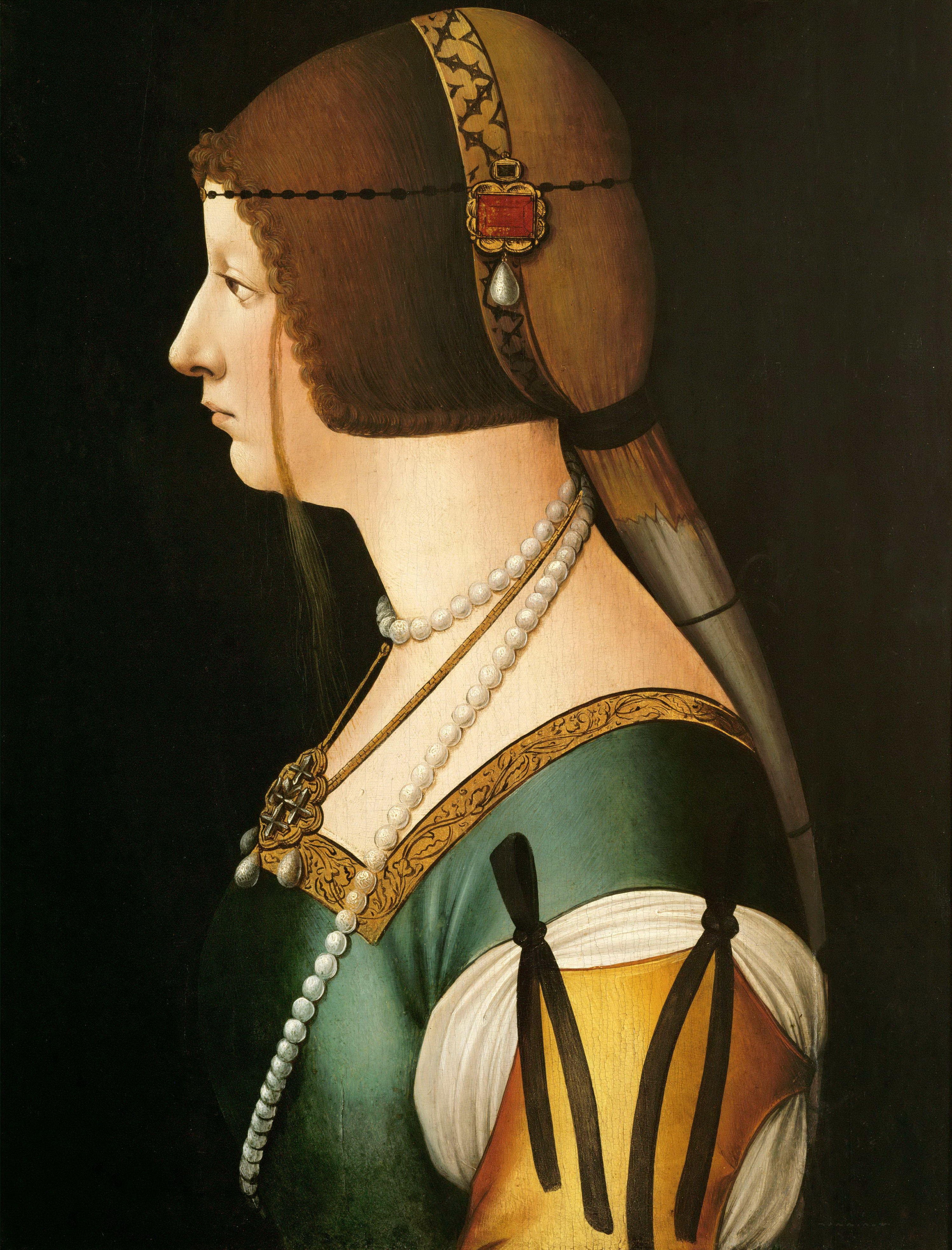 Profilbildnis Kaiserin Bianca Maria di Galeazzo Maria Sforza (1472-1510)